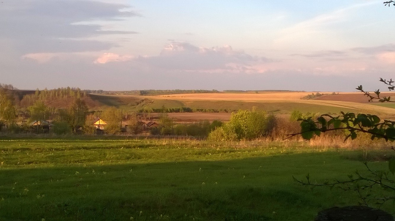 вид